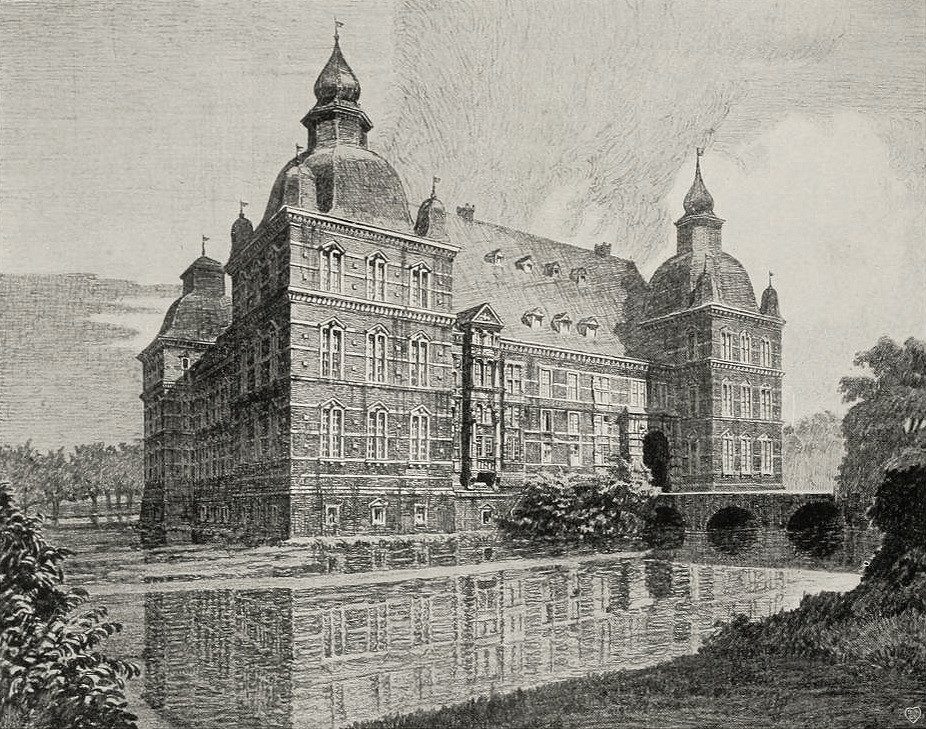 Rekonstruktion der Nordansicht von Schloss Horst